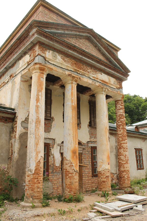 Сядзіба Агінскіх у Залессі